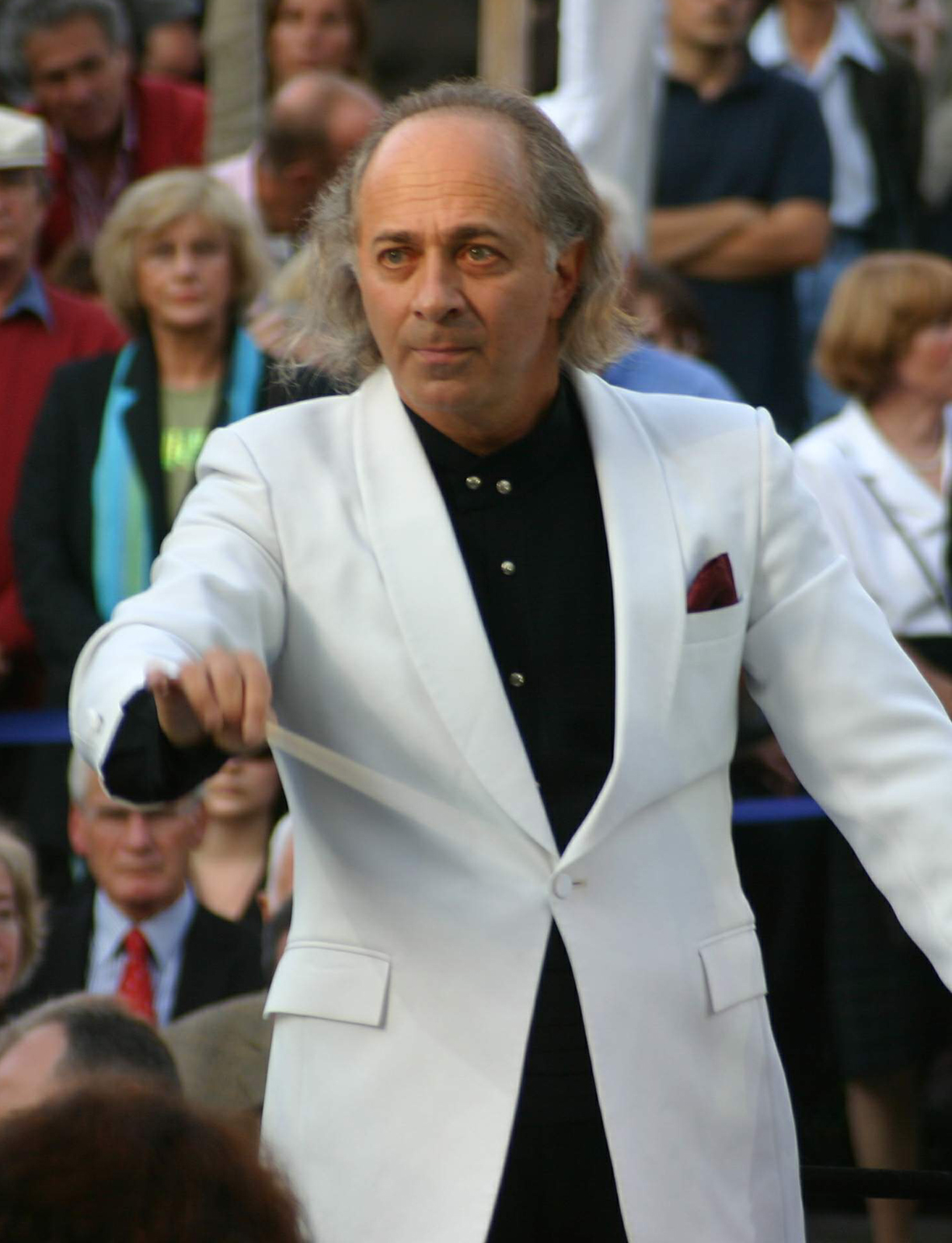 David Stahl, Chefdirigent des Staatstheaters am Gärtnerplatz. Nachtrag: Gestorben am 24 Oktober 2010.